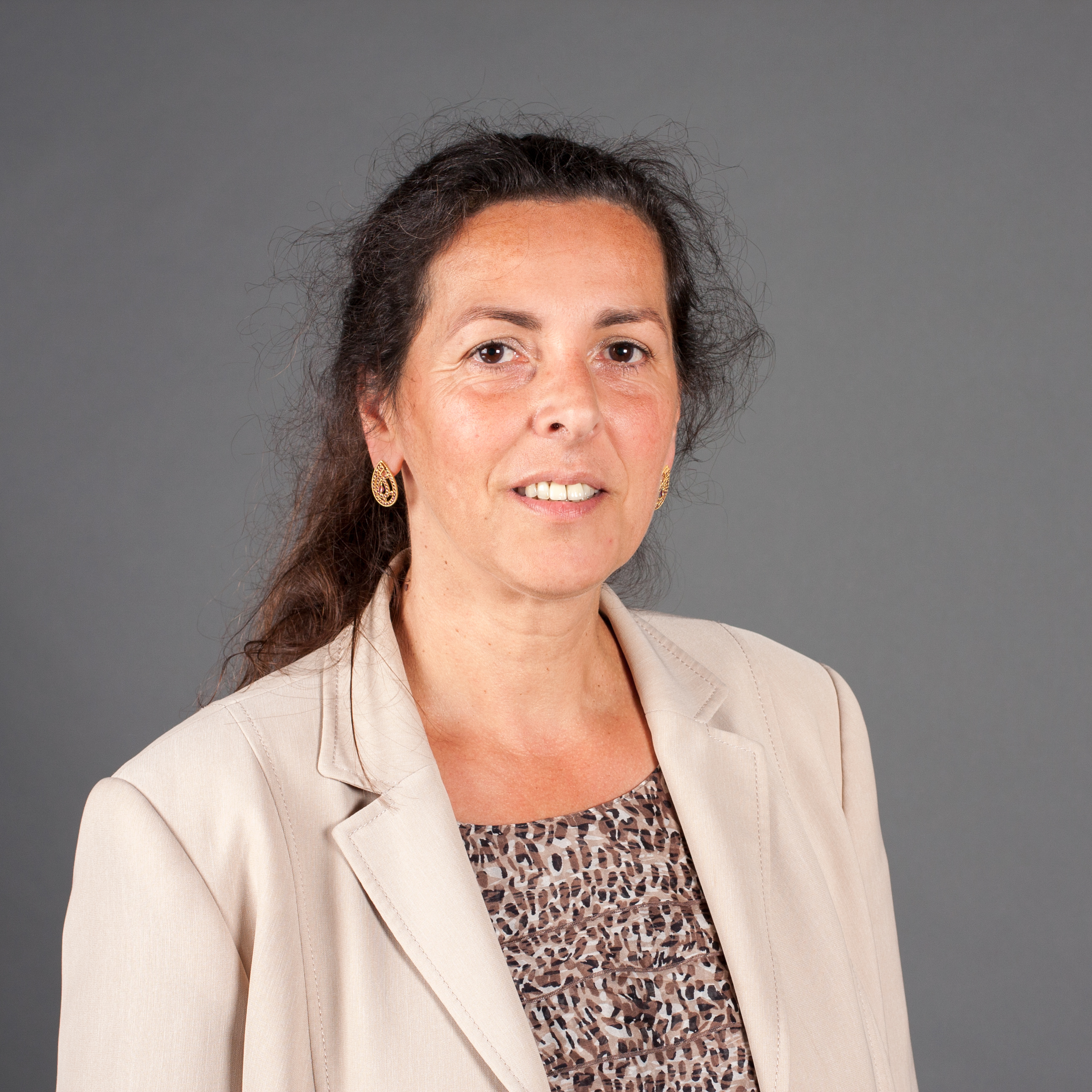 Karen Stramm, Landtag Mecklenburg-Vorpommern, Fraktion die Linke